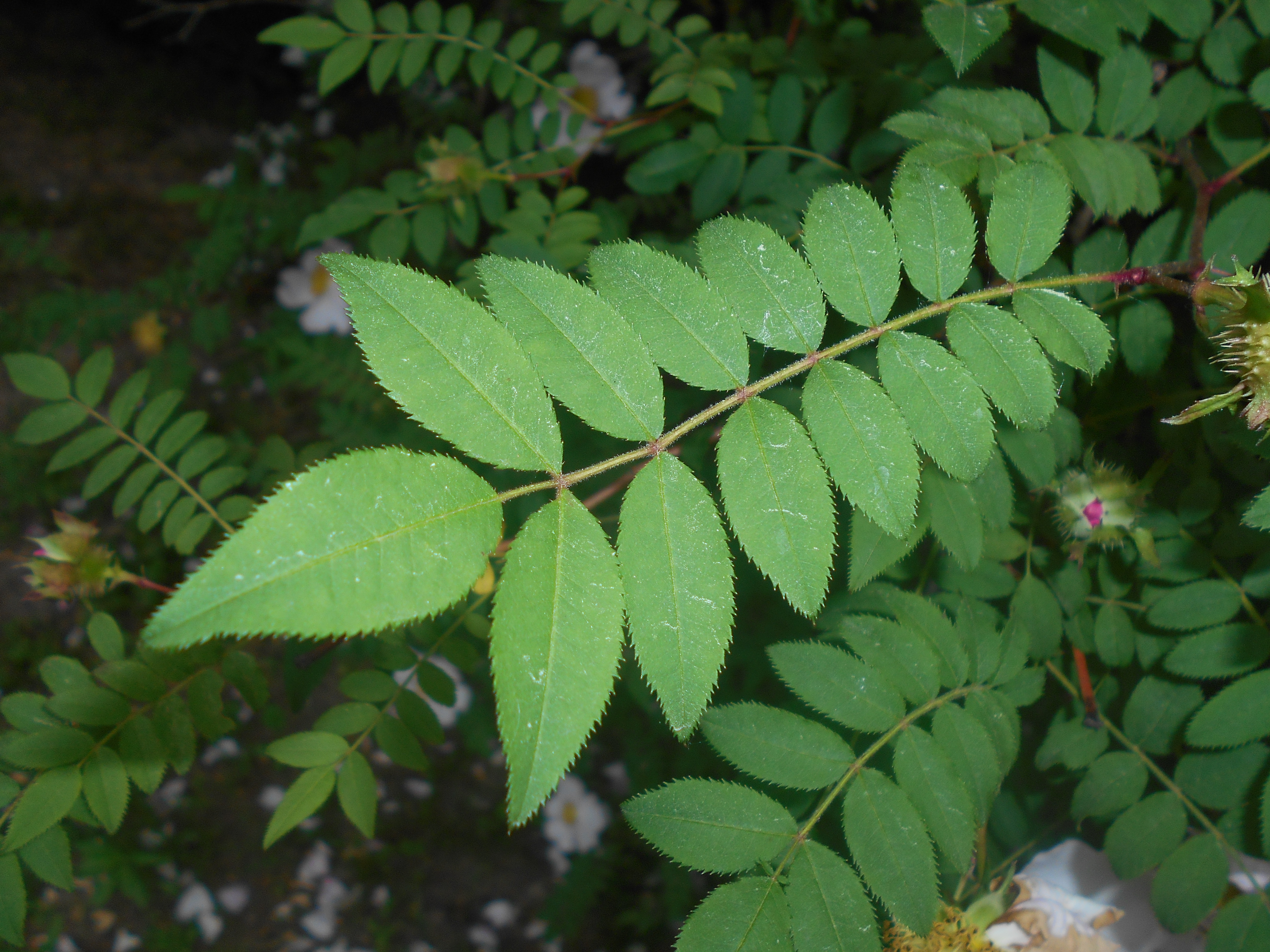 Róża kasztanowa (Rosa roxburghii), Ogród Botaniczny UMCS w Lublinie.